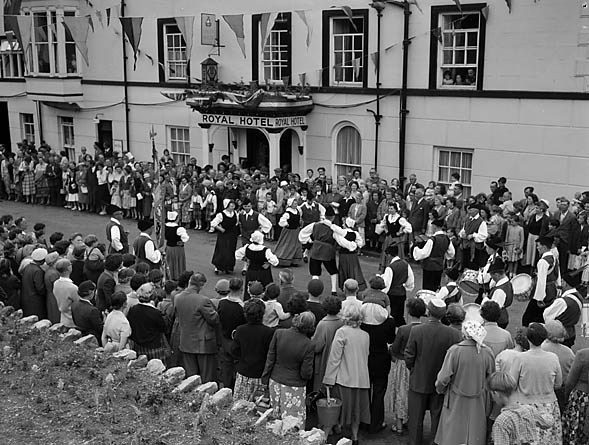 Teitl Cymraeg/Welsh title: Eisteddfod Gerddorol Ryngwladol Llangollen Ffotograffydd/Photographer: Geoff Charles (1909-2002) Dyddiad/Date: July 10, 1957 Cyfrwng/Medium: Negydd ffilm / Film negative Cyfeiriad/Reference: (gch11347) Rhif cofnod / Record no.: 3369572 Rhagor o wybodaeth am gasgliad Geoff Charles yn Llyfrgell Genedlaethol Cymru More information about the Geoff Charles Collection at the National Library of Wales Mae ffotograffau Geoff Charles hefyd yn rhan o Broject Europeana Libraries Geoff Charles' photographs also form part of the Europeana Libraries Project